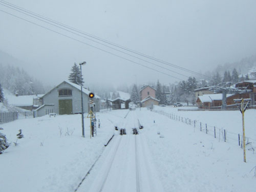 Gare de Vallorcine, Haute Savoie, France - Entrée de la gare depuis la frontière Suisse